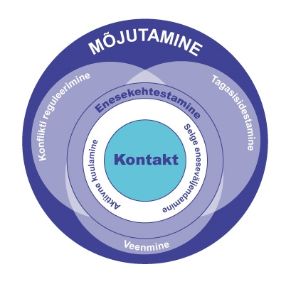 Baasilise suhtlusoskuse - kontakti oskuste - seosed ja asend suhtlusoskuste hulgas